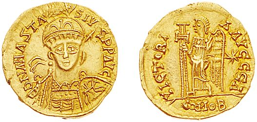 Solidus (sou d’or) du royaume des Francs - Clovis Ier (481-511) - au nom d’Anastase. Avers : ΟNΛNΛSTΛ-SIV-SPPΛVC. Buste casqué et cuirassé de face (type byzantin) tenant une lance et un bouclier orné d’un cavalier. Revers : VICTORI-ΛΛUCCCΛ Victoire debout à gauche tenant une longue croix perlée. Dans le champ à droite, une étoile à huit branches. A l’exergue, COMOB.